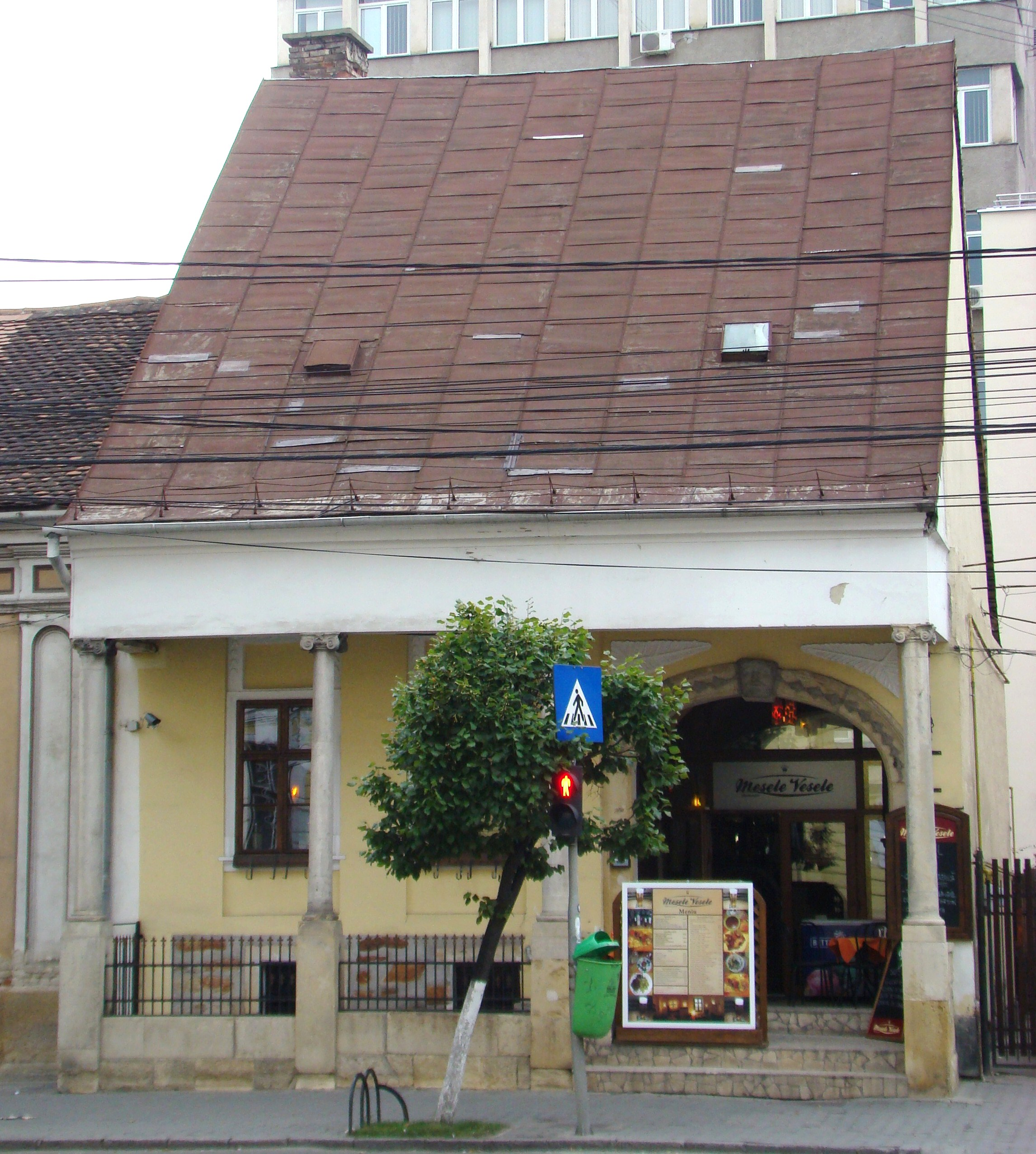 Clădire monument istoric, Calea Moților, nr. 8